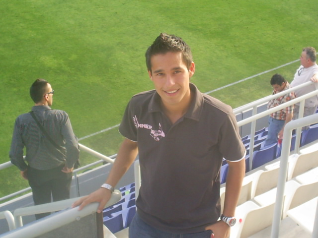 foto tomada en el estadio de tenerife